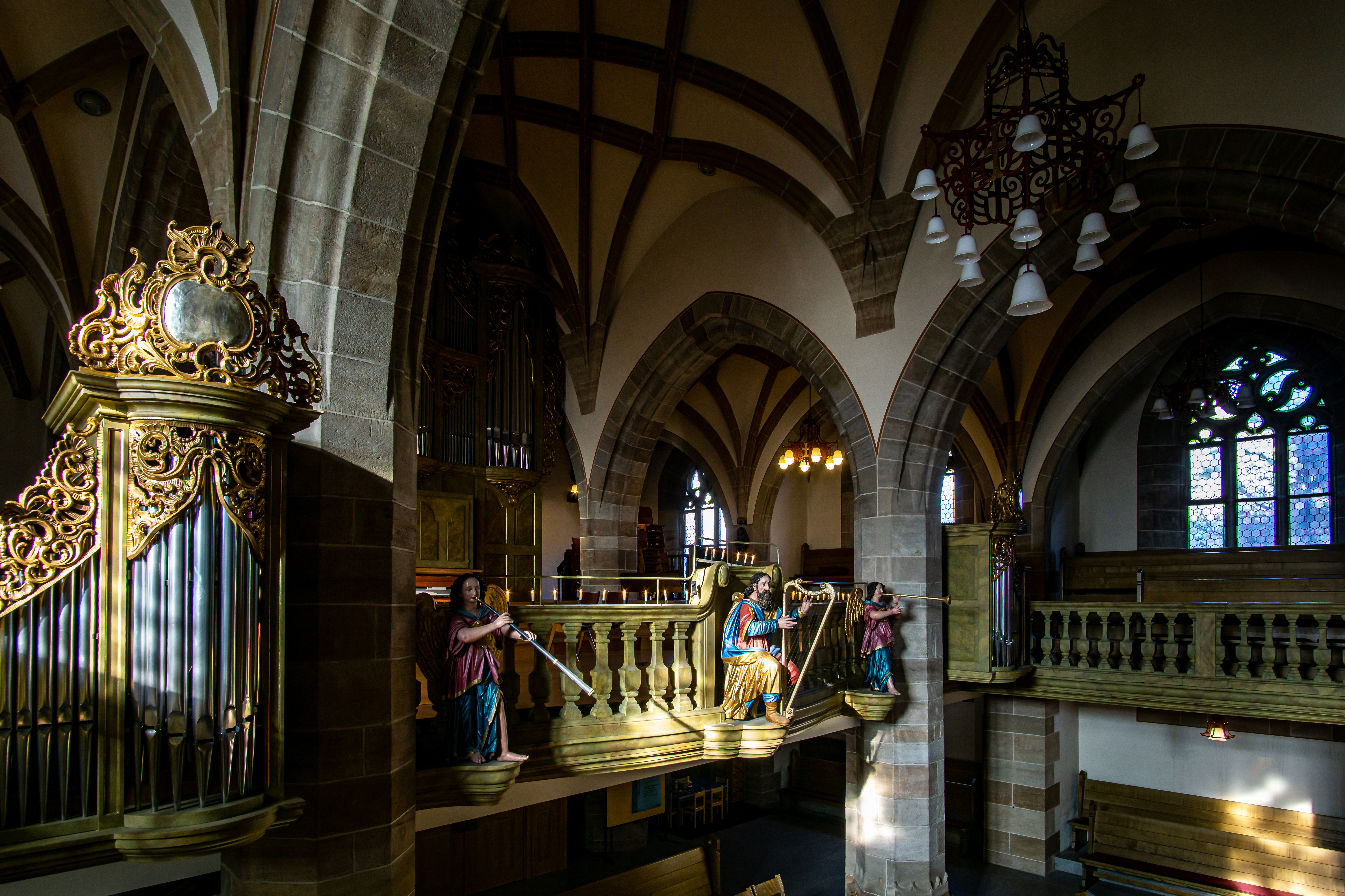 Stadtkirche Balingen -Orgel